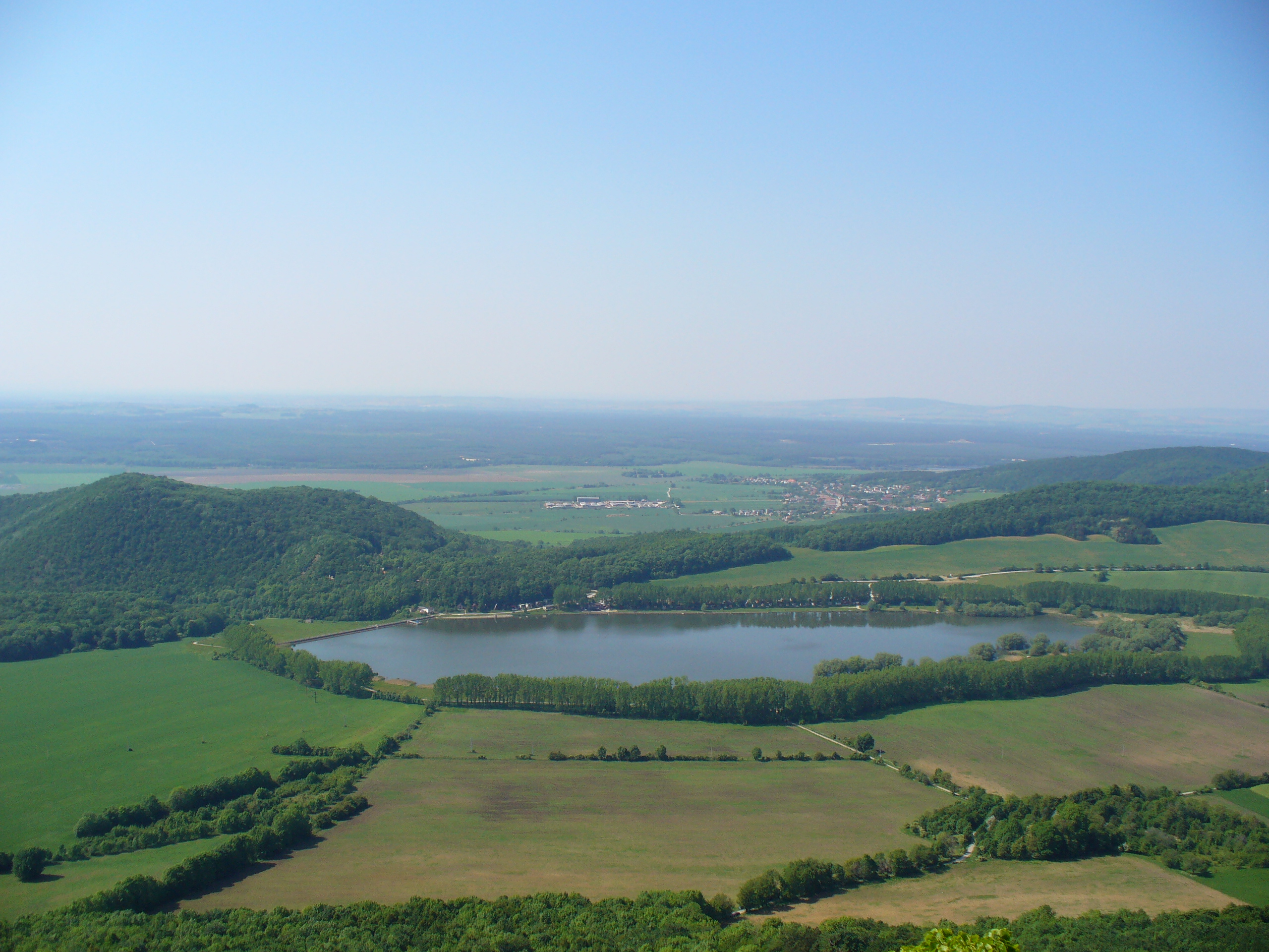 Prievaly and Buková reservoir, Slovakia